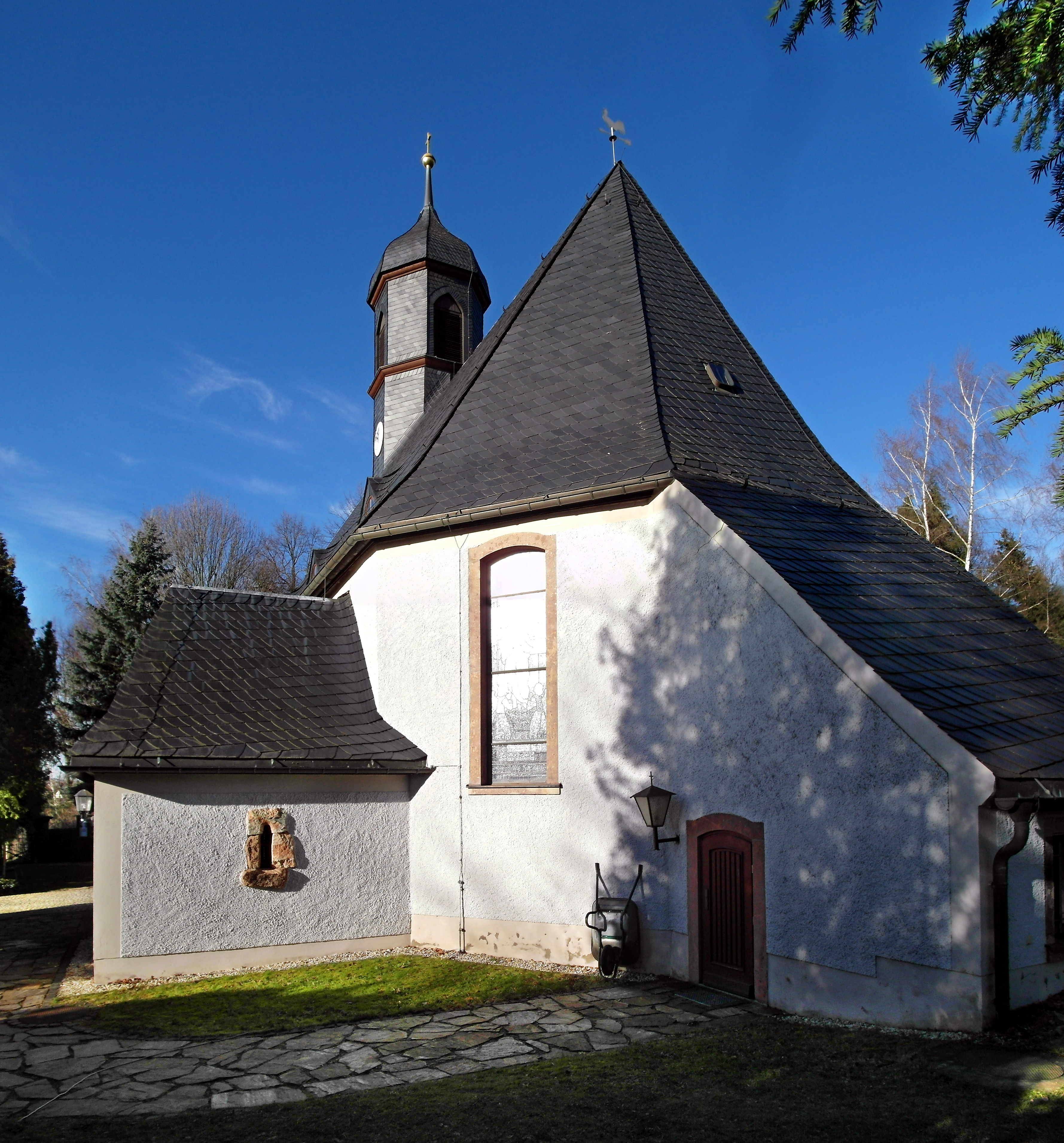 13.12.2017 09387 Leukersdorf (Jahnsdorf/Erzgebirge), Bei Hauptstraße 55. Evangelische Kirche Leukersdorf (GMP: 50.768101,12.820185). 1782 erneuerte Dorfkirche mittelalterlichen Ursprungs. Sicht von Südwesten. [SAM3321+3323.JPG]20171213170MDR.JPG(c)Blobelt